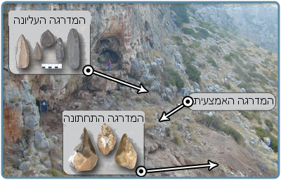 Misliya Cave